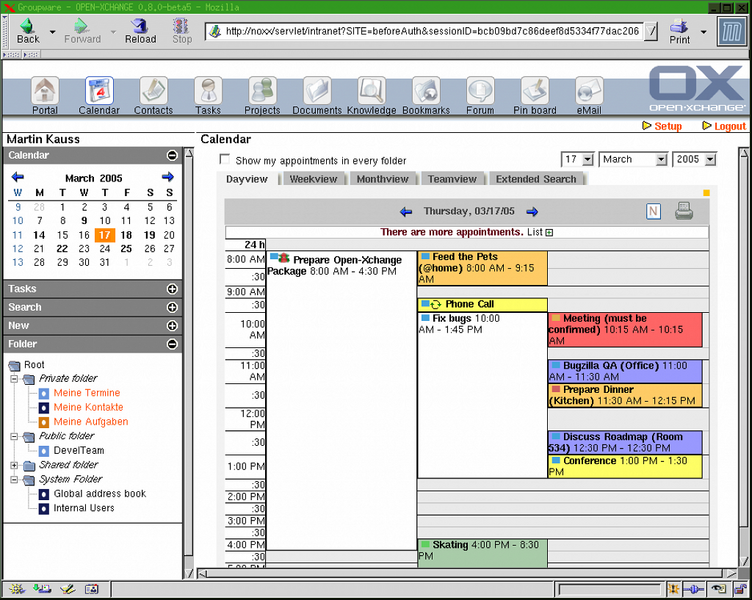 Pantallazo software libre Open Xchange.